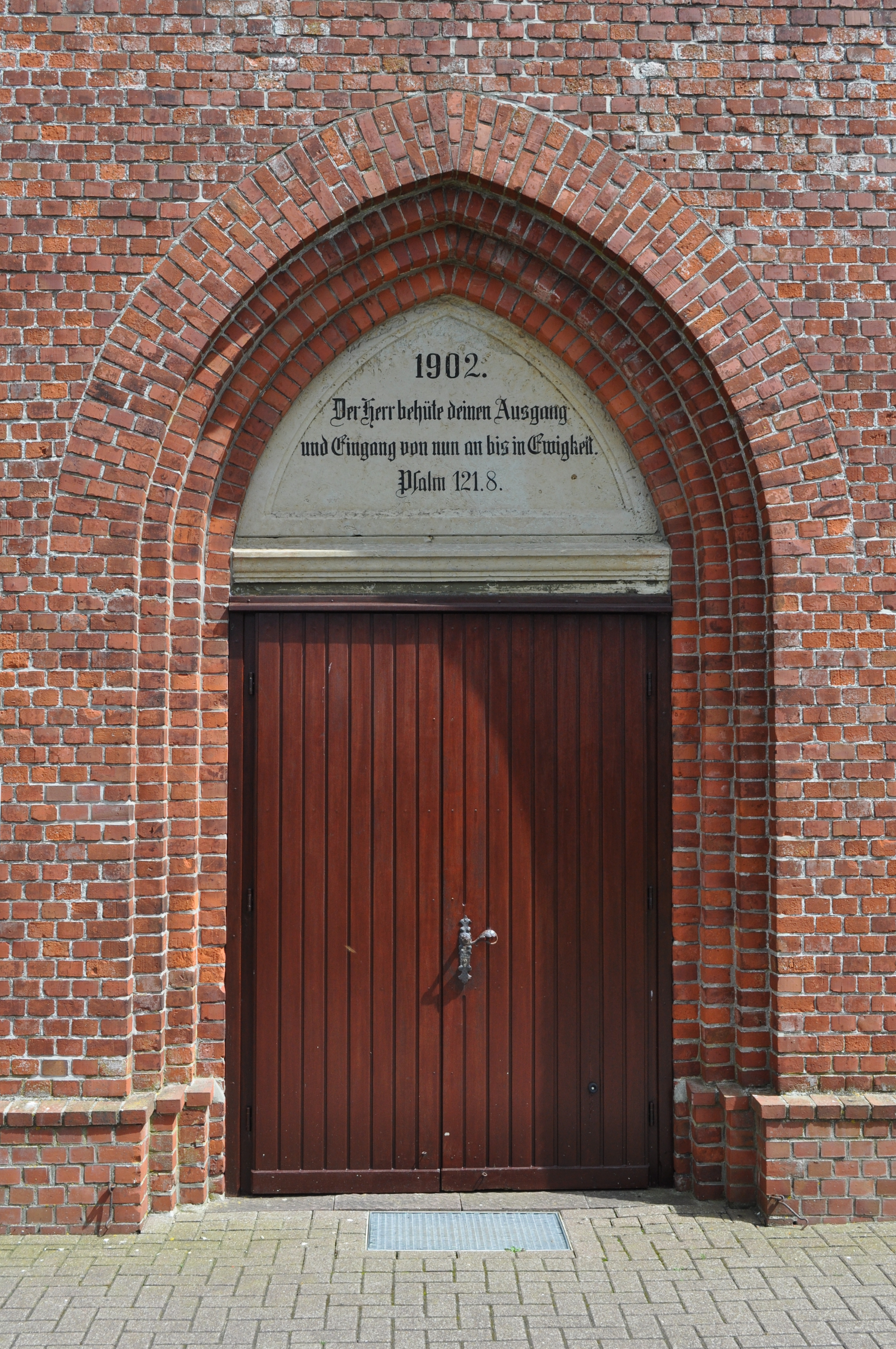 Kirche St. MIchaelis in Hemmoor-Basbeck,Portal. This is a photograph of an architectural monument.